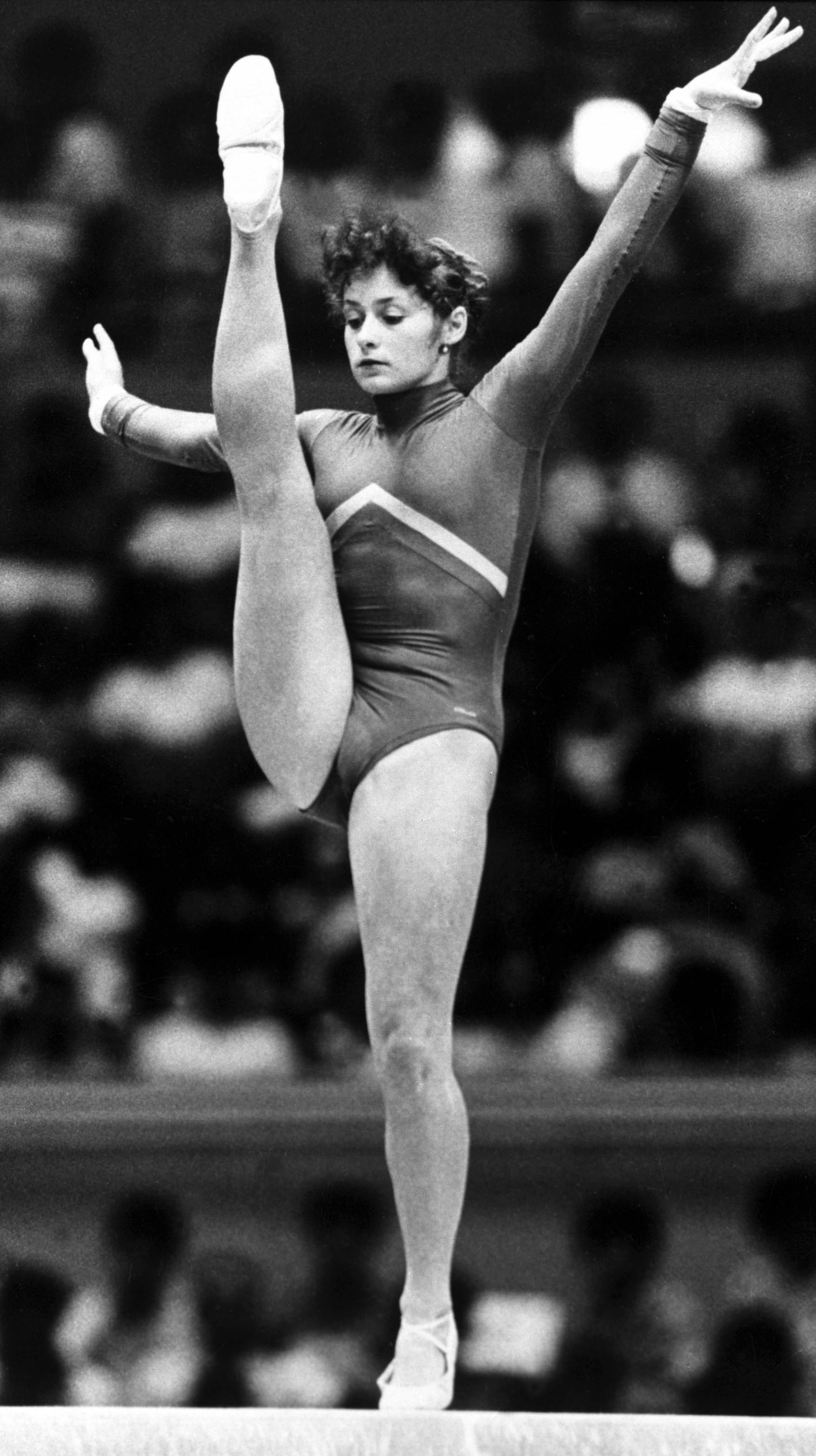 Ecaterina Szabo în timpul evoluției la bârnă unde a câștigat medalia de aur, în cadrul competițiilor Universiadei de la Kobe, Japonia (1985)